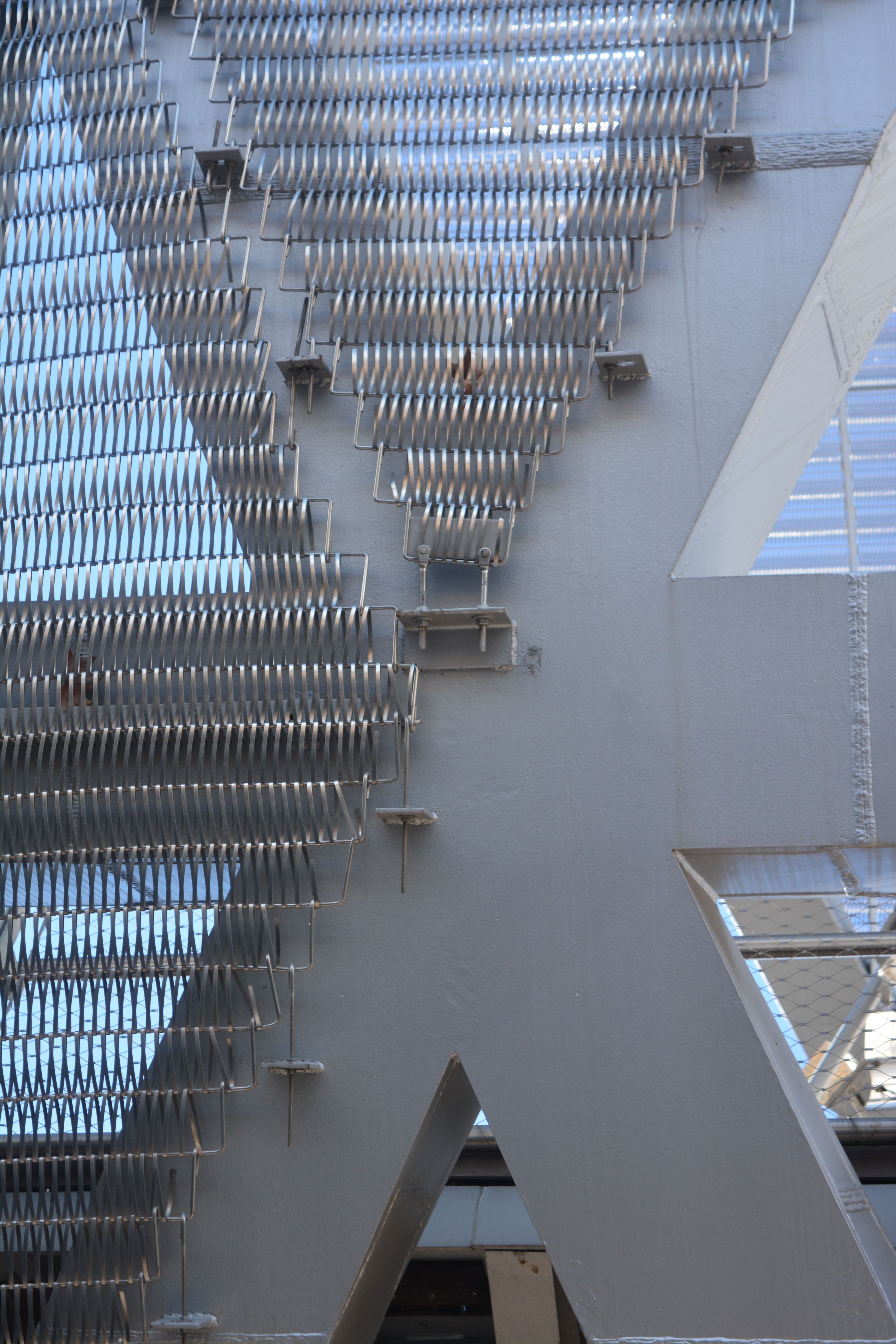 Detalle exterior envolvente